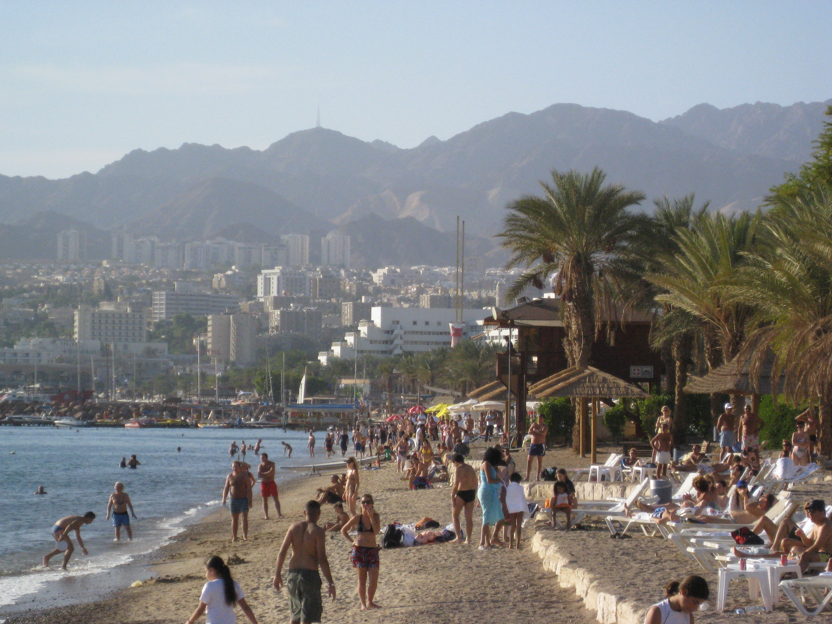 Eilat, Israel